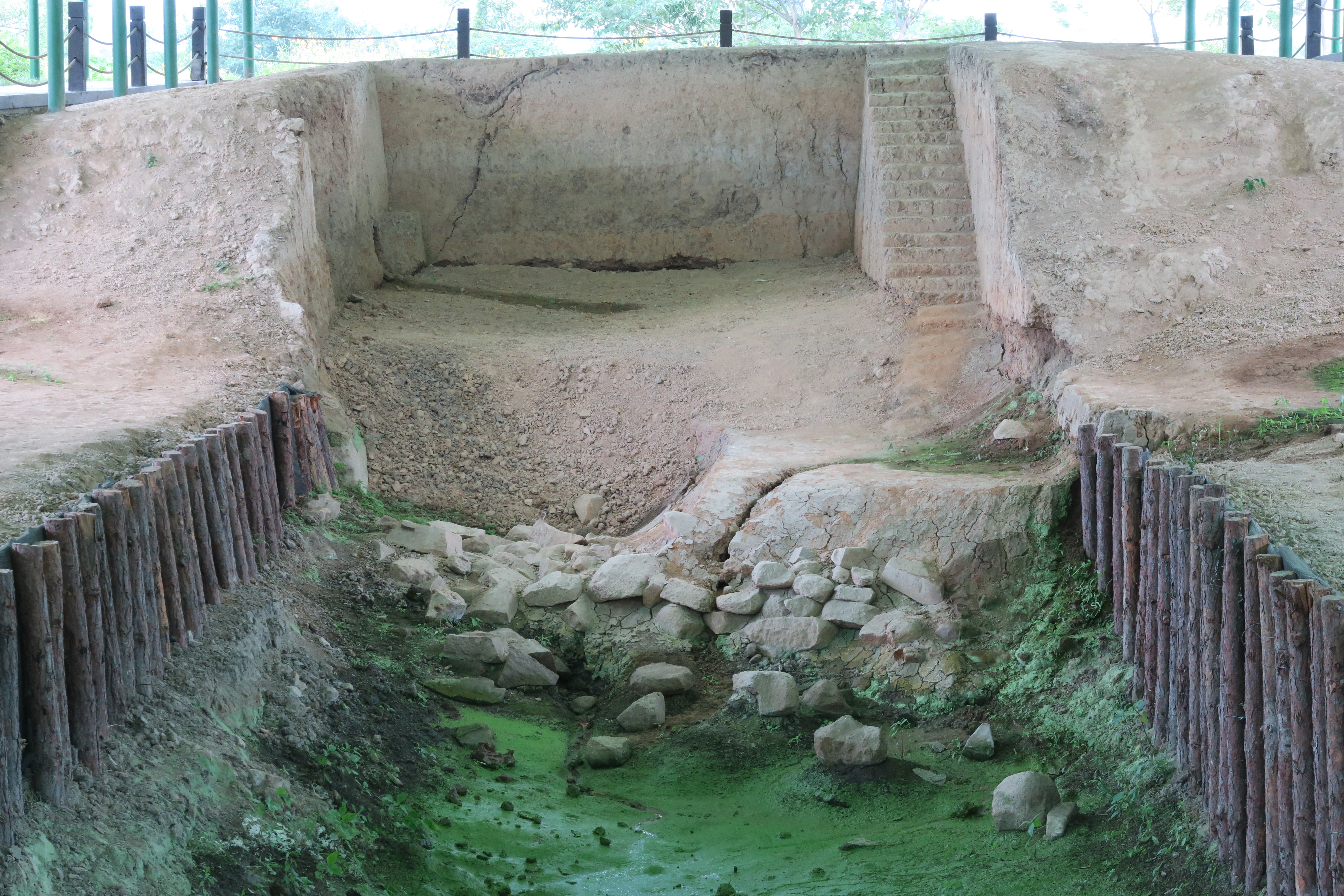 良渚古城北城墙展示区